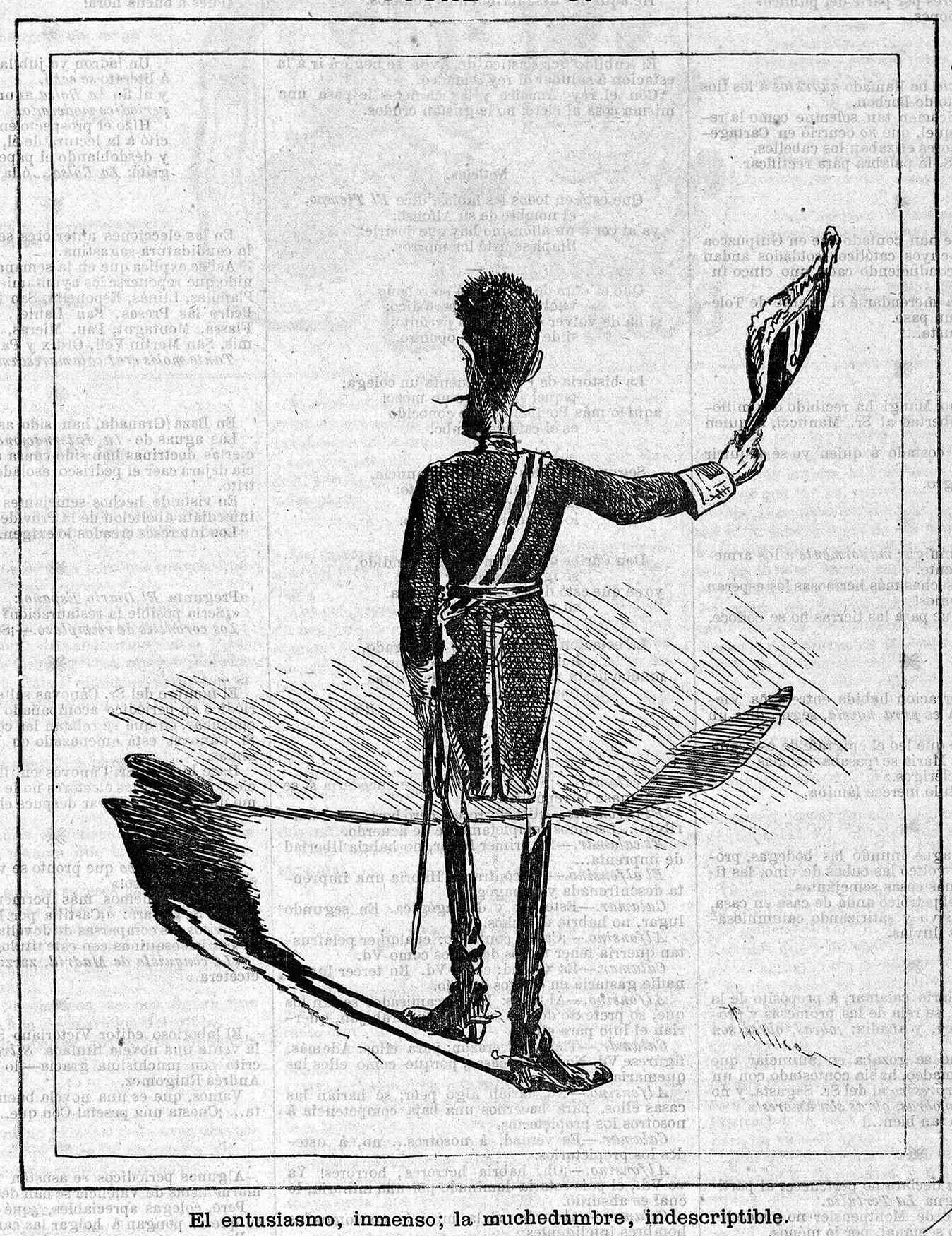 El entusiasmo, inmenso; la muchedumbre, indescriptible, en la revista satírica española Gil Blas.